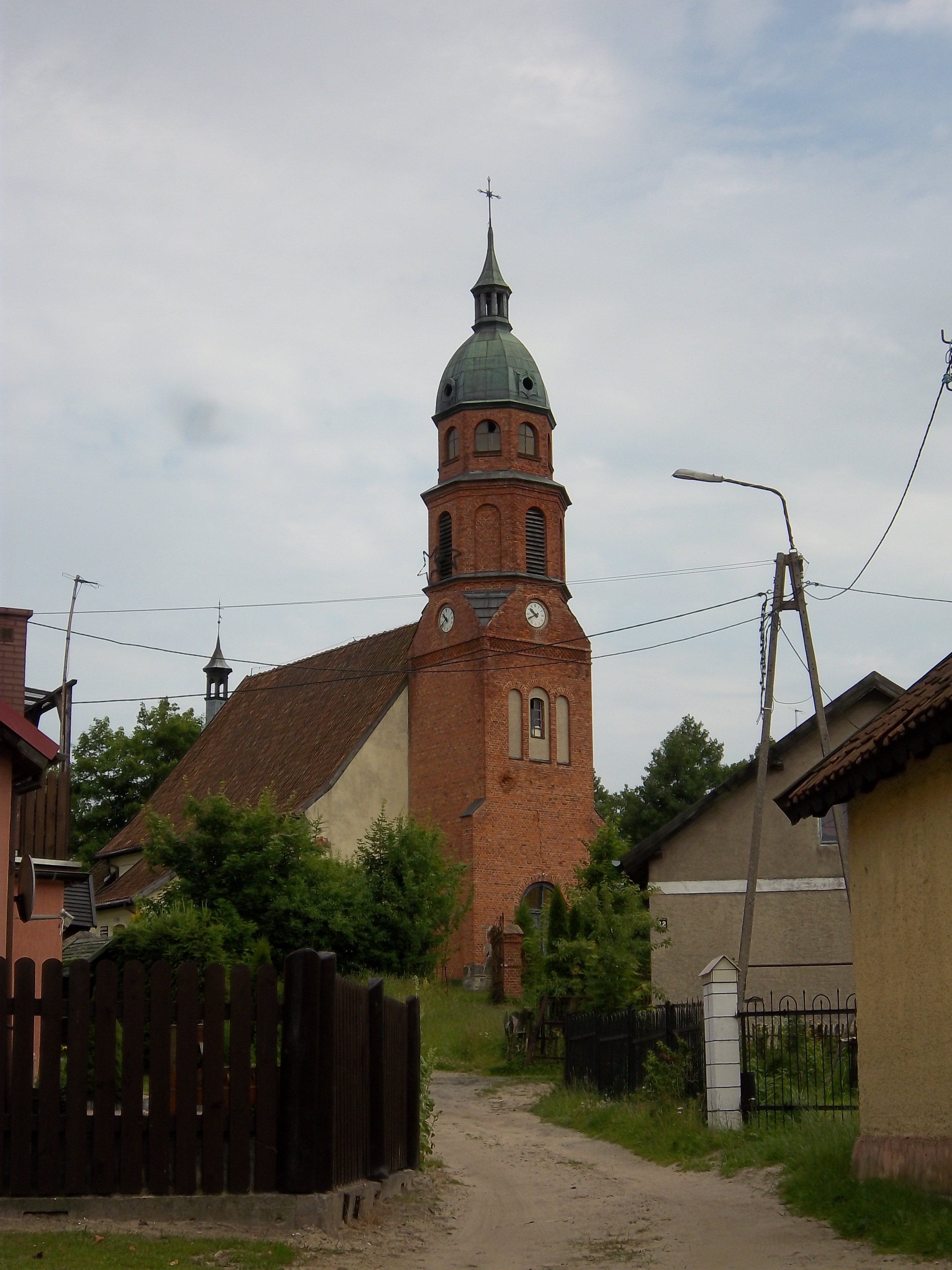 Bartołty Wielkie - rzymskokatolicki kościół parafialny p.w. św. Jakuba Apostoła, 2 poł. XVI, XVII, poł. XIX